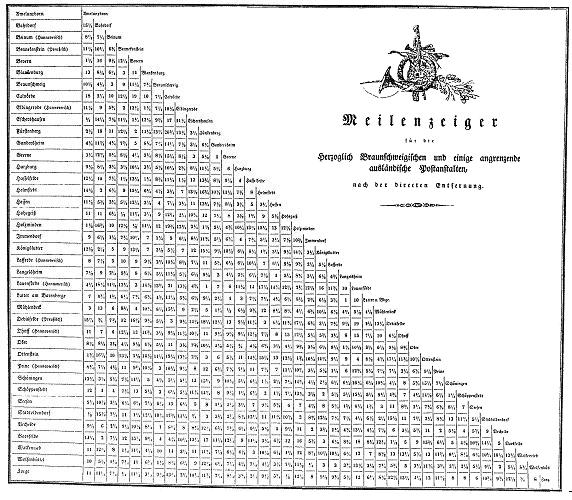 Braunschweiger Meilenzeiger copiert W.Steven 16:43, 21. Feb. 2007 (CET) 2007